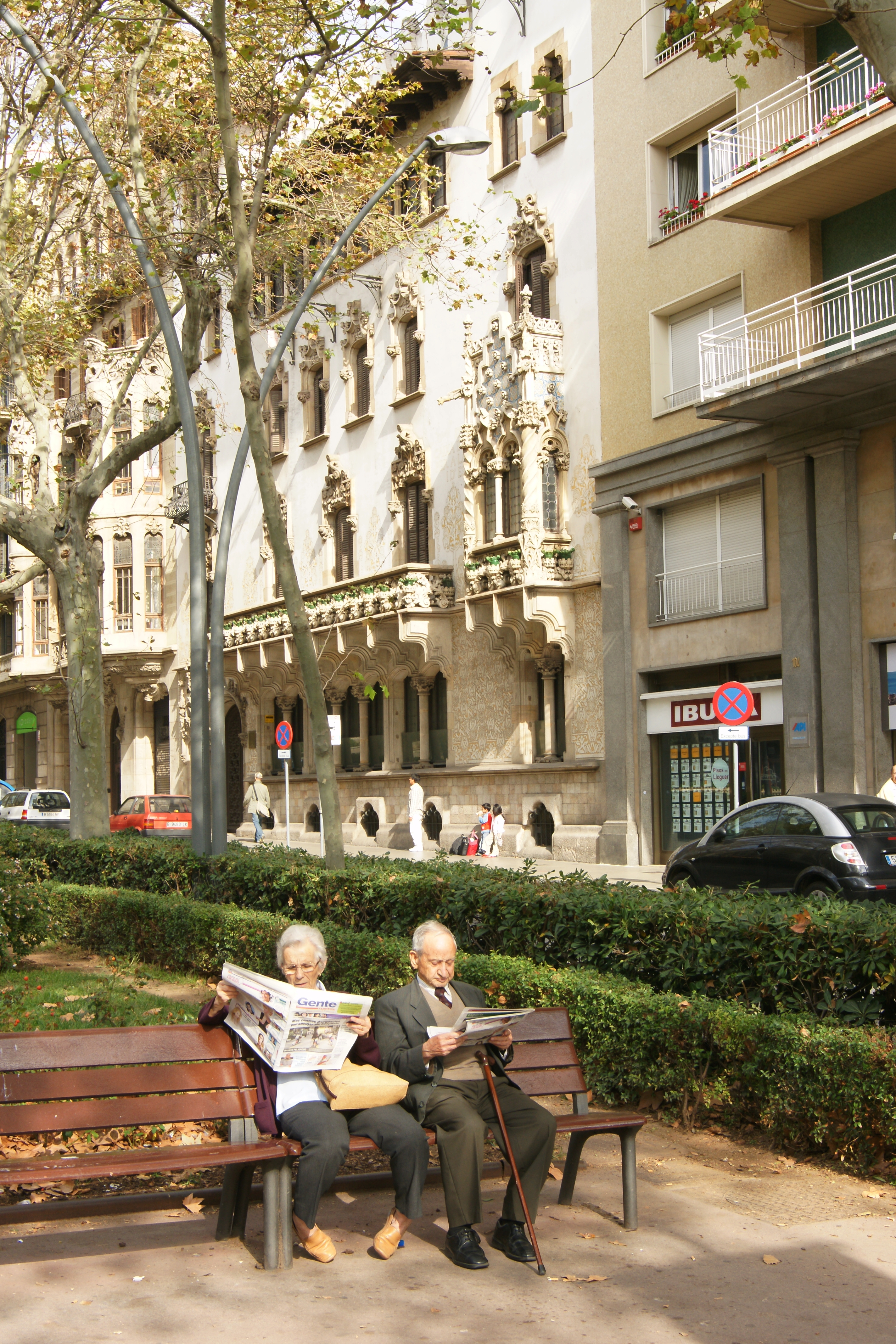 Casa Macaya 1899 bis 1901 errichtet von Josep Puig i Cadafalch. Ein elegantes Wohnhaus mit einem grossen Innenhof, das von unterschiedlichen Künstlern mitdekoriert wurde. Heute ist dieses Gebäude das Kulturzentrum der "La Caixa", eine der führendsten Banken Spaniens mit Café, Buchhandlung und Kunstausstellungen. In Passeig de Sant Joan Nr.108, Barcelona.